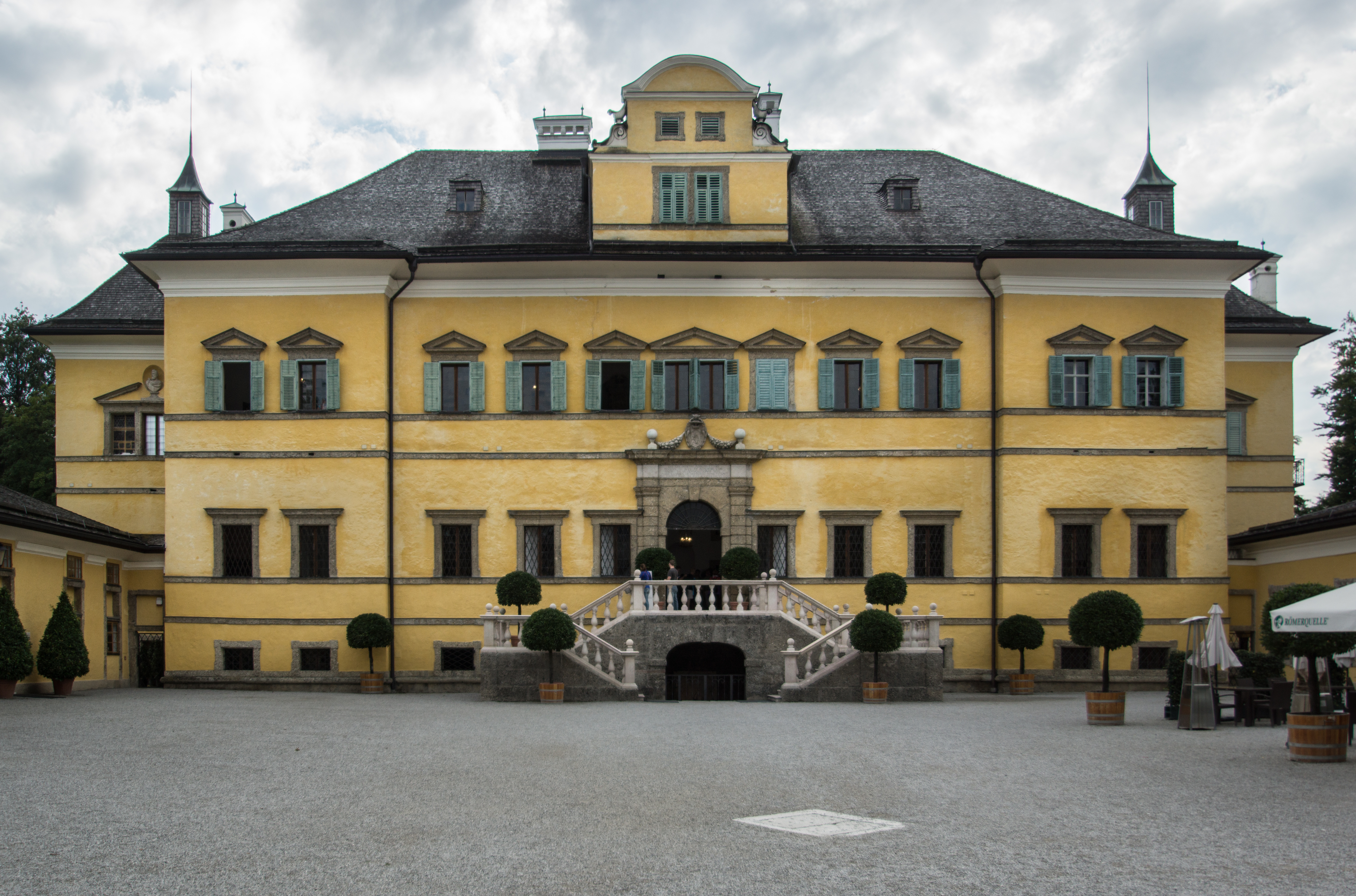 Schlossanlage Hellbrunn, Gesamtanlage samt Gartenbaudenkmalen